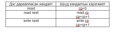 Монгол: Шуул хандалт